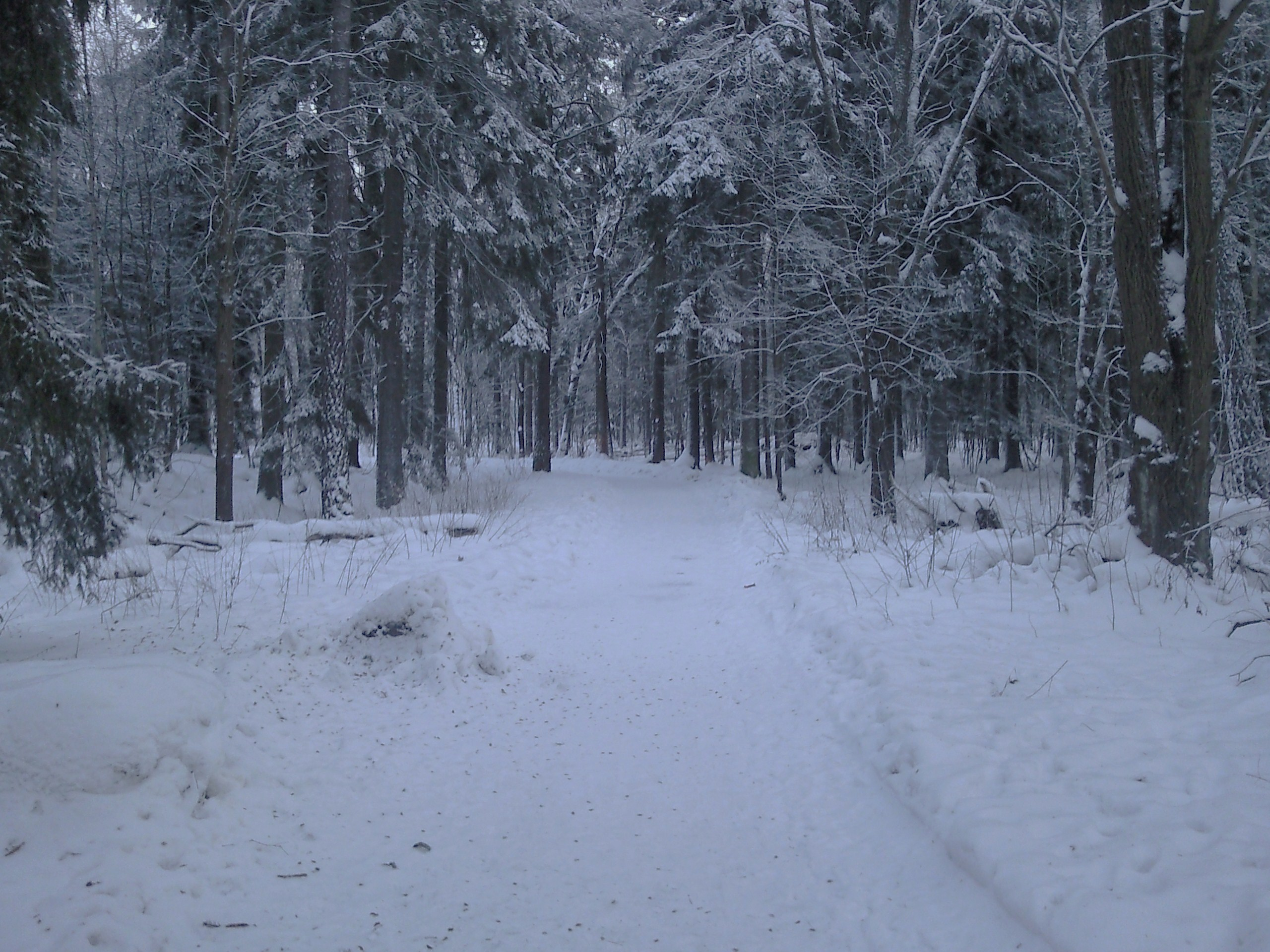 Davvisámegiella: Metsehsyn Majrooisa, Svedmyras.